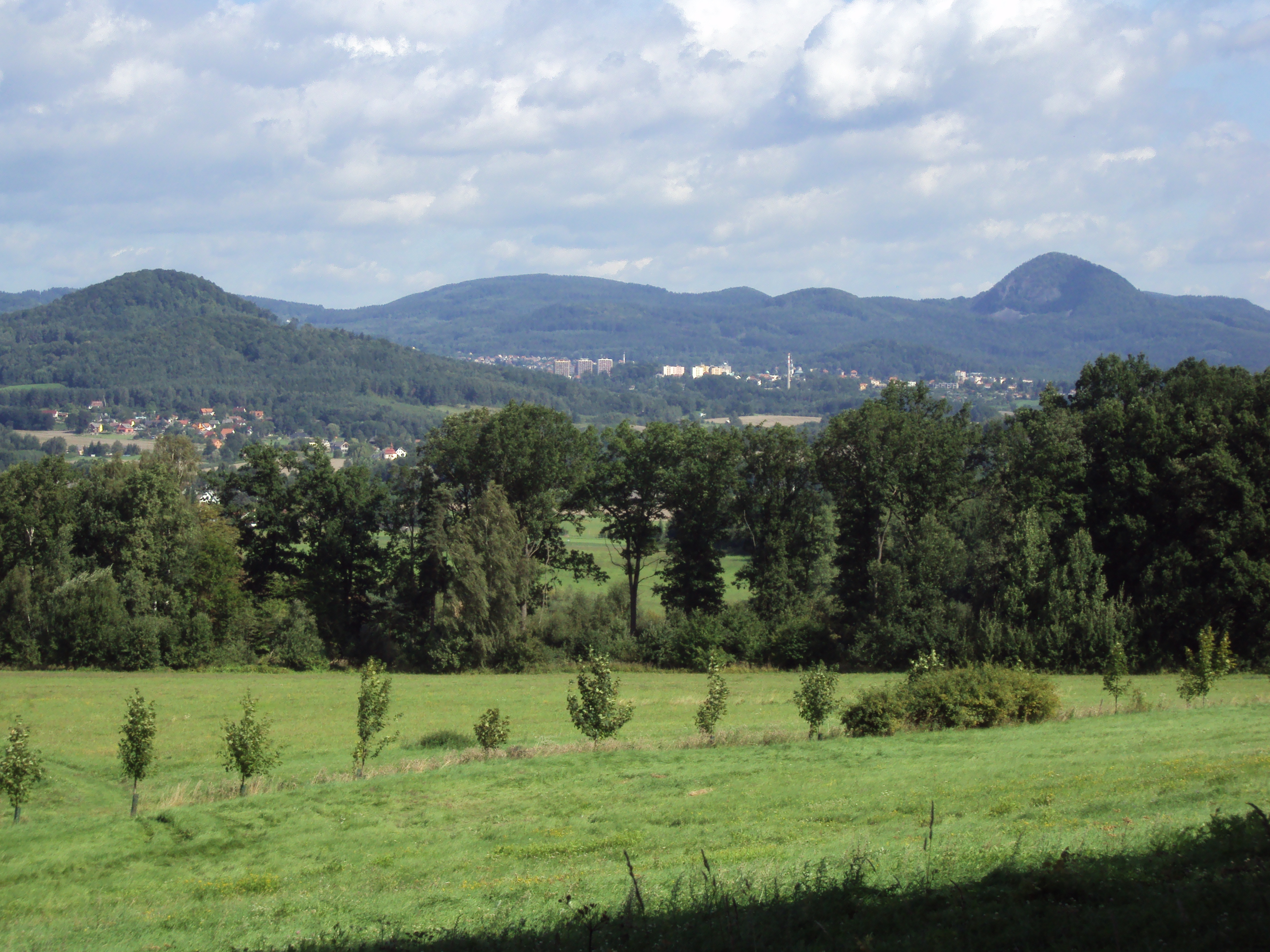 Z úpatí vrchu Špičák na okraji České Lípy jsou vidět Lužické hory, uprostřed Nový Bor